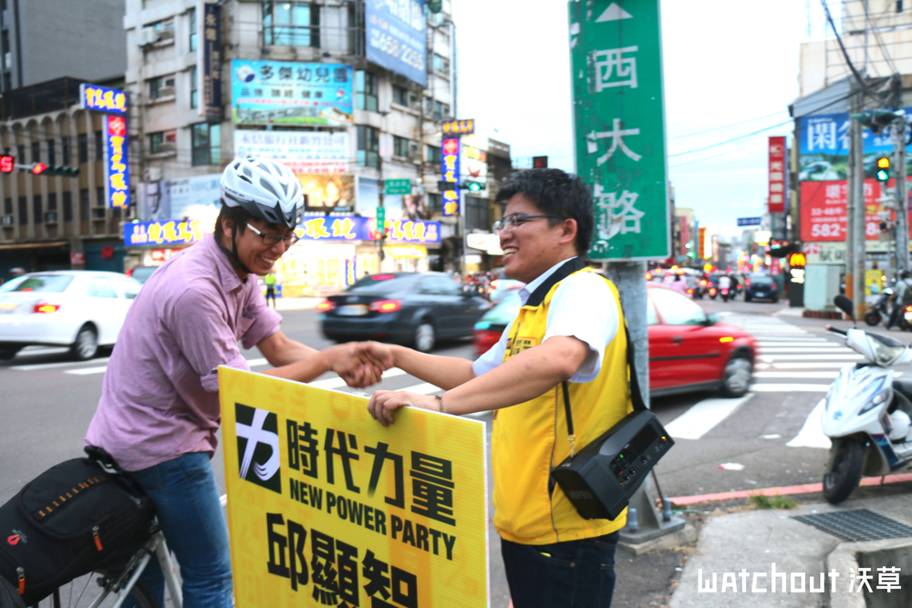 中文（台灣）: 邱顯智｜新竹市立委擬參選人